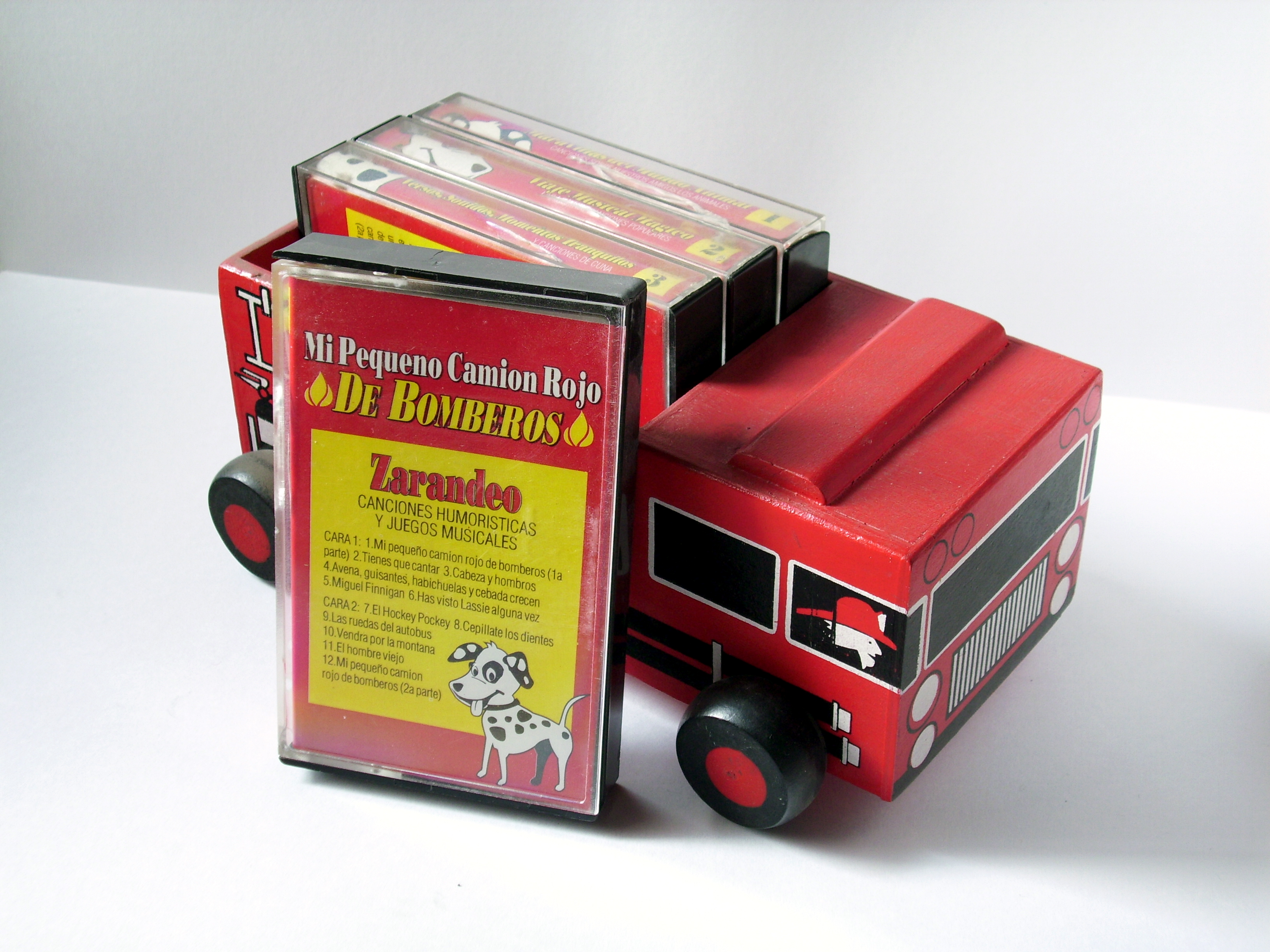 La versión en español de My Little Red Firetruck (Mi pequeño camión rojo de bomberos), publicado por el dúo canadiense Judy & David en 1993.